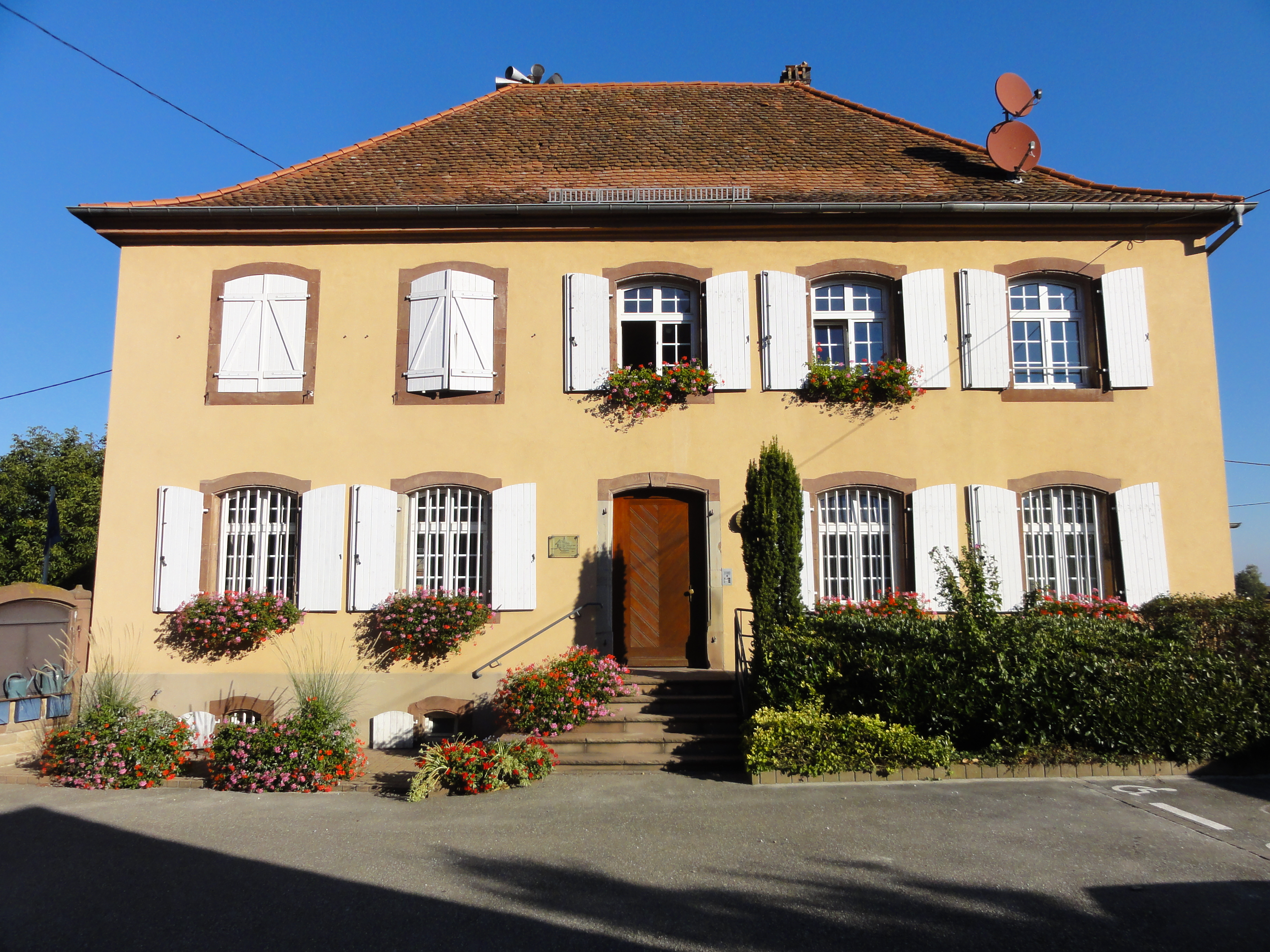 Alsace, Bas-Rhin, Saessolsheim, Ancien presbytère (1750), actuellement mairie, 27 rue Principale. .